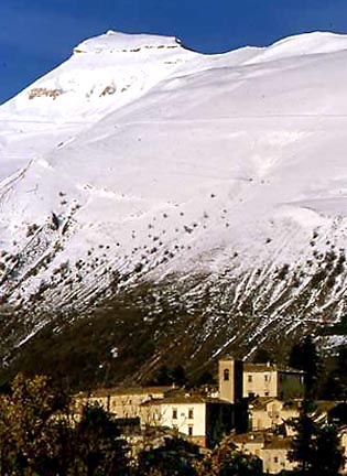 Montemonaco sullo sfondo di Monte Sibilla